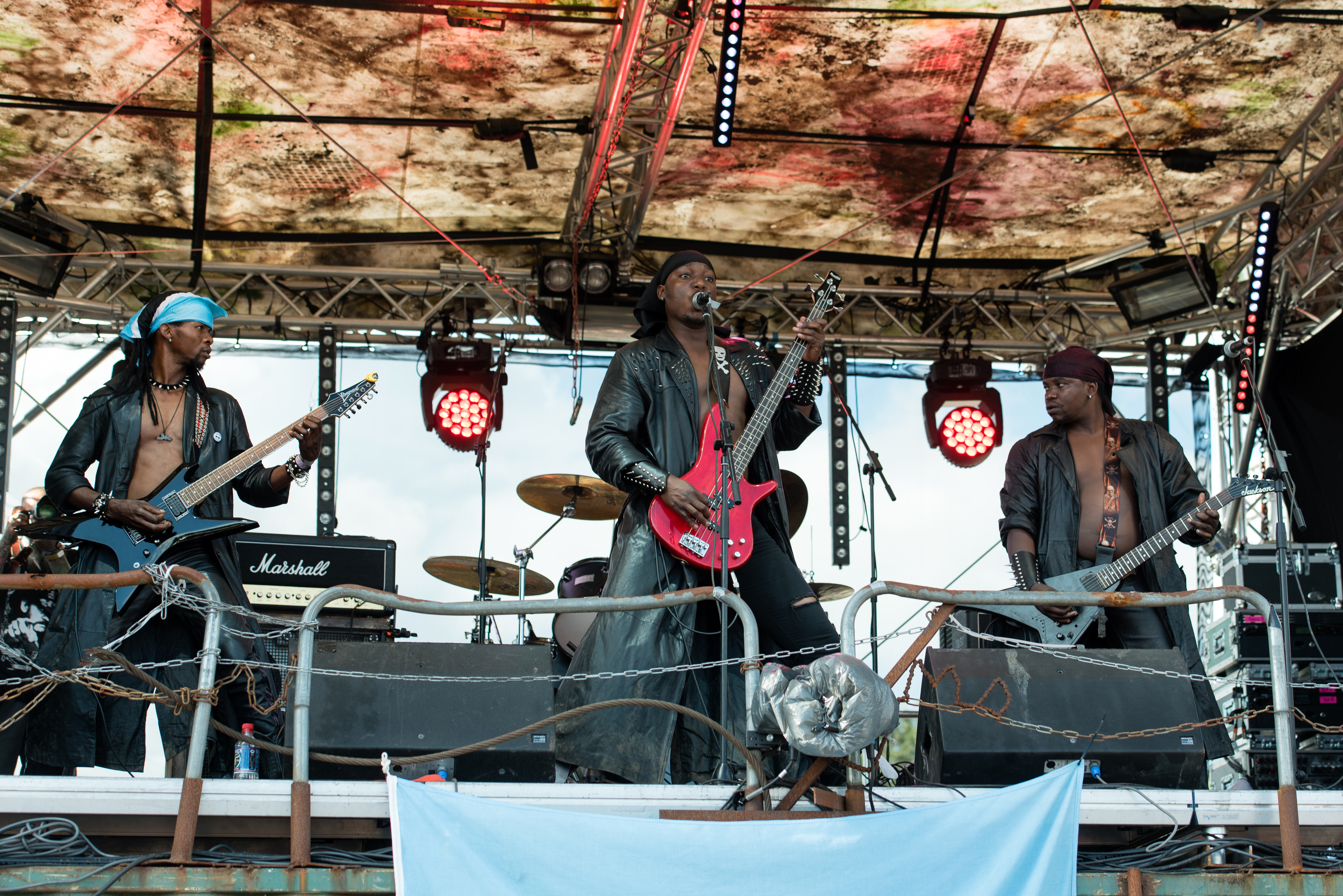 Overthrust beim Wacken Open Air 2016